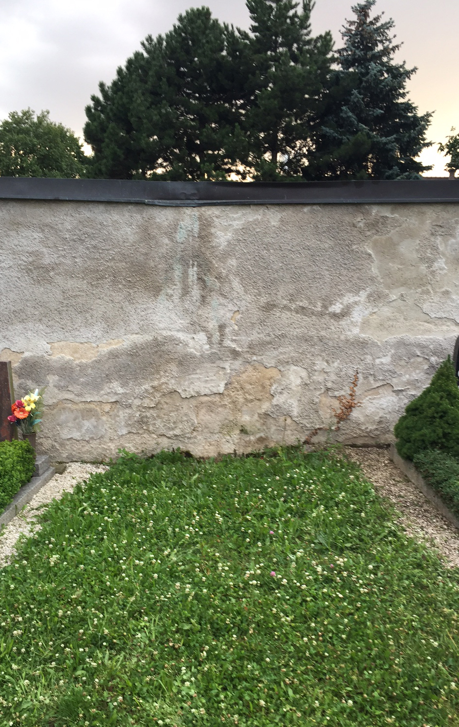 Grabstelle Alois Hitler am Friehof Leonding nach Auflassung, Juli 2016